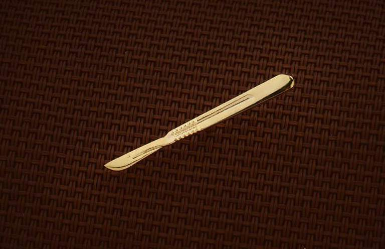 bisturi sicari